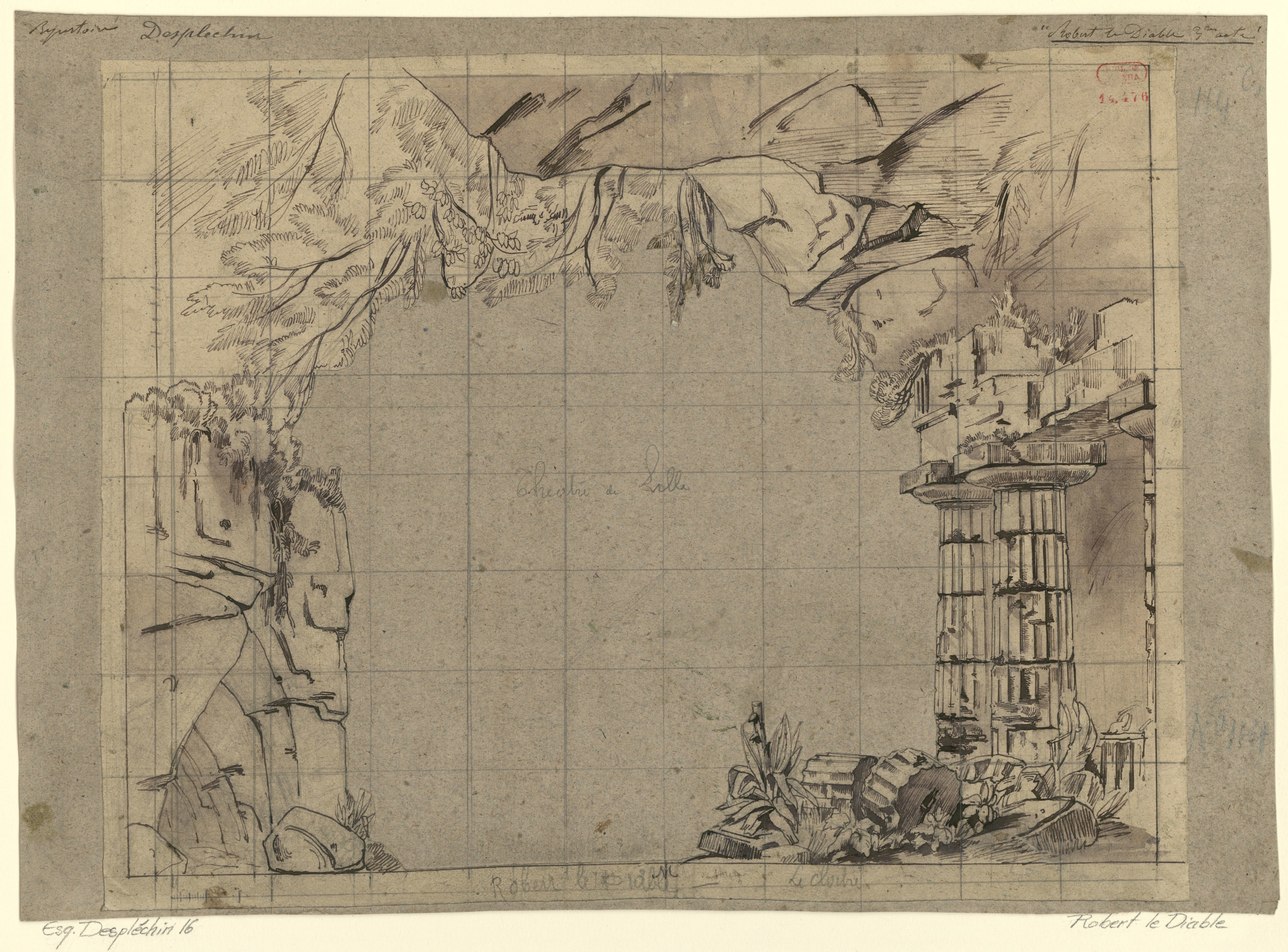 Esquisse pour Robert le Diable de Meyerbeer - Lille : Théâtre de Lille, 1831